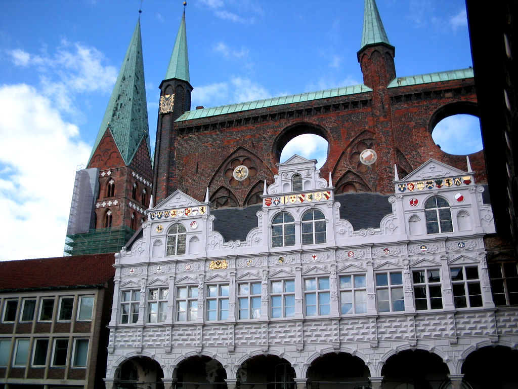 Lübeck townhall detail.